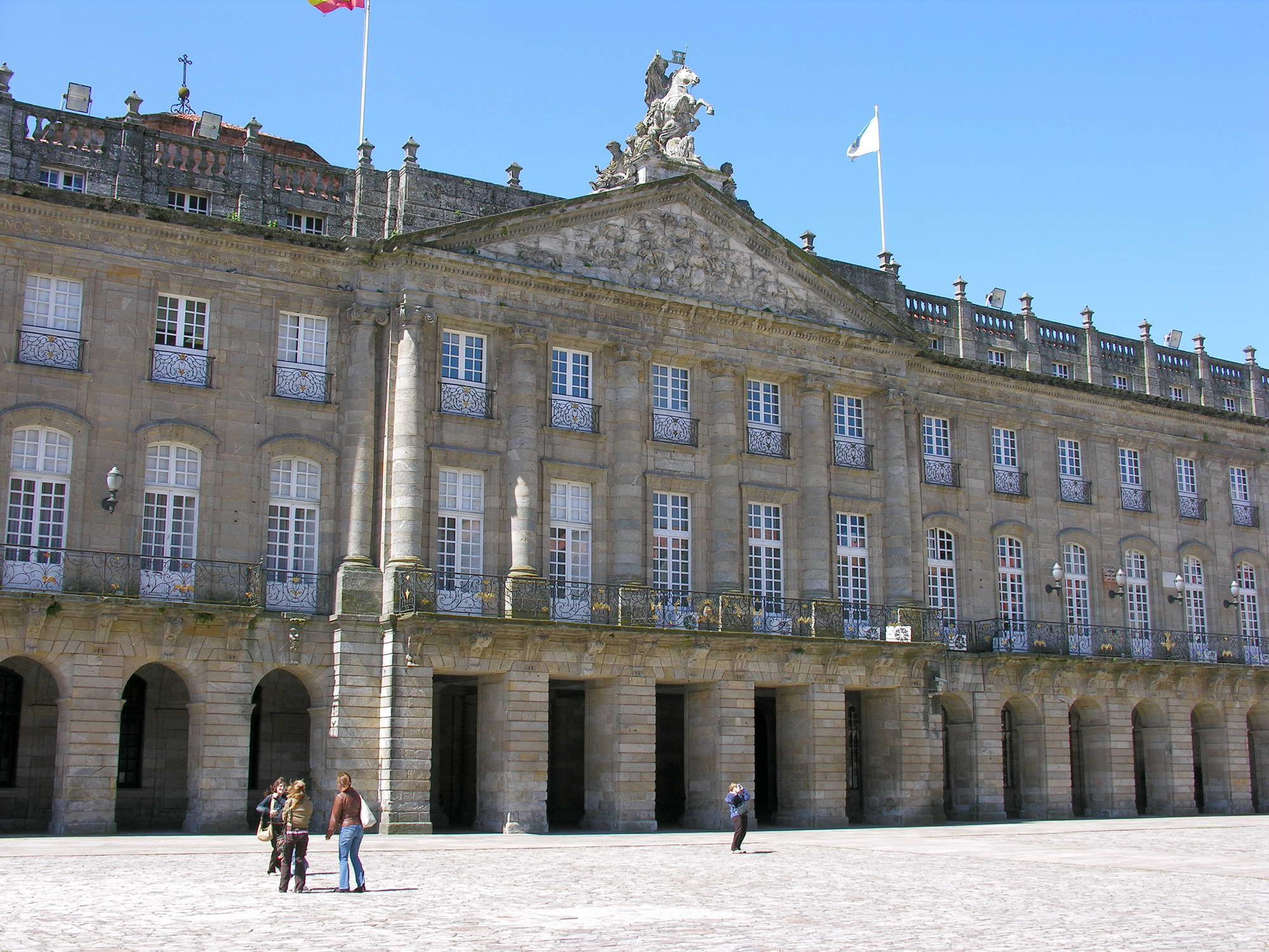 self made. Concello (Ayuntamiento) Santiago de Compostela, Galicia, Spain.